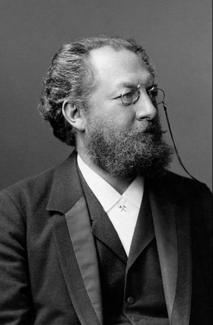 Wilhelm Beumer. Photographie von J. C. Schaarwächter